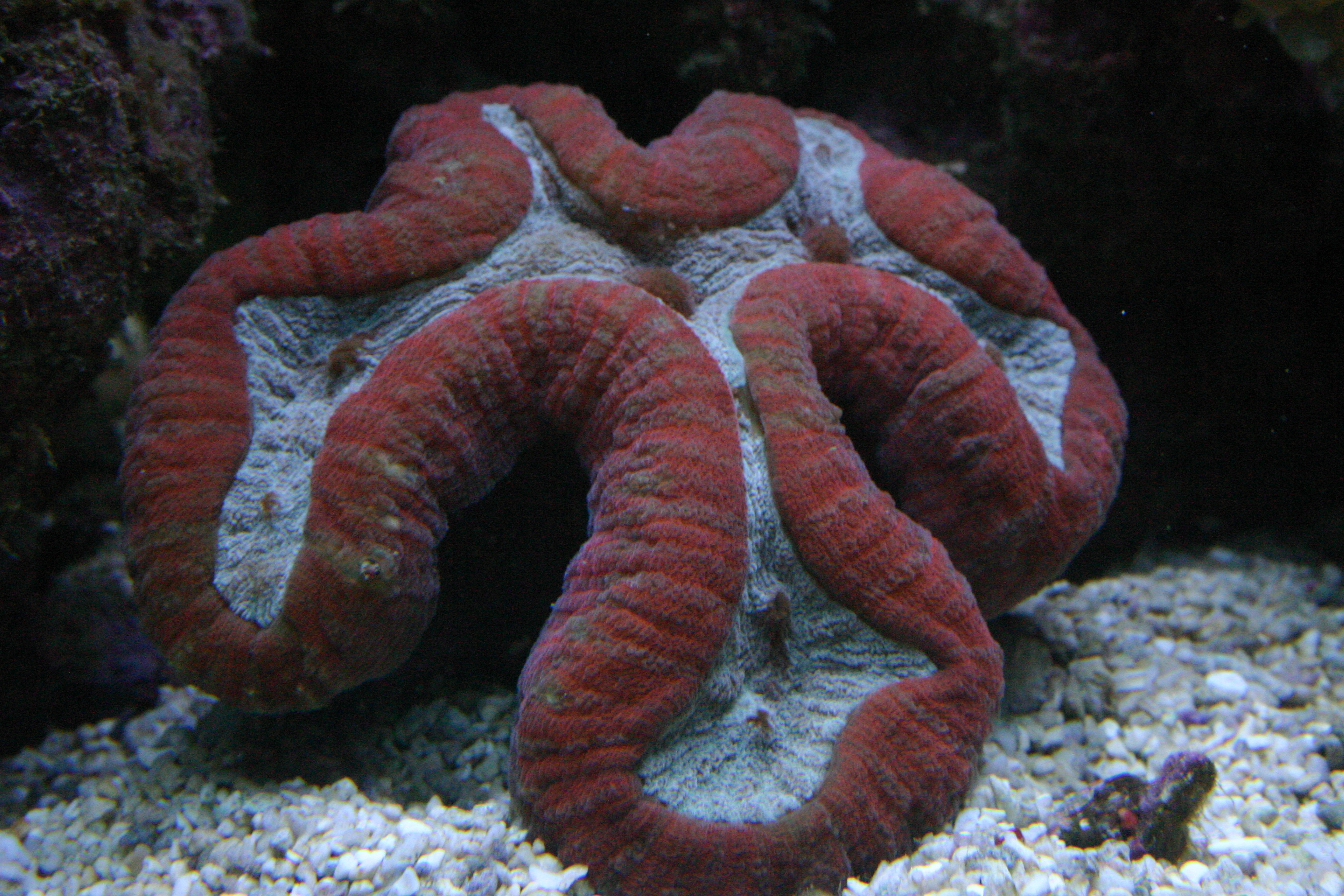 Lobophyllia en acuario